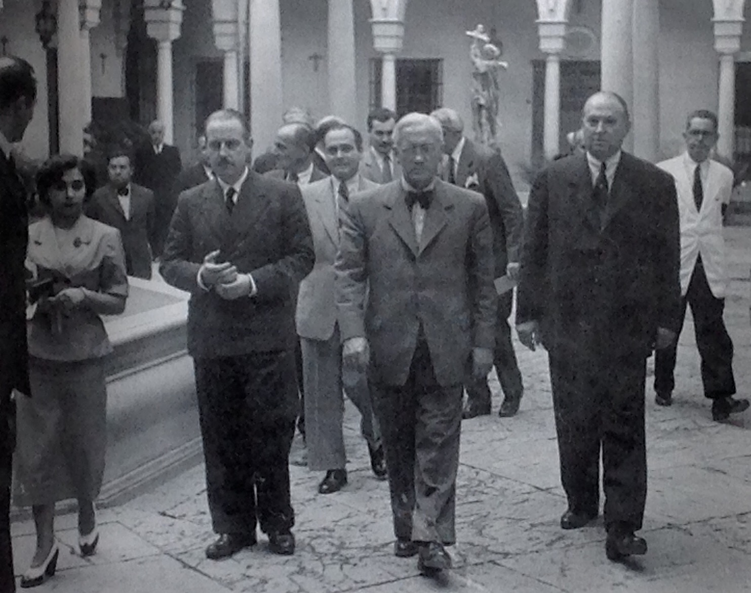 El doctor Alexander Fleming en la visita al Hospital de la Caridad de Sevilla junto al doctor Francisco Navarro López en junio de 1948